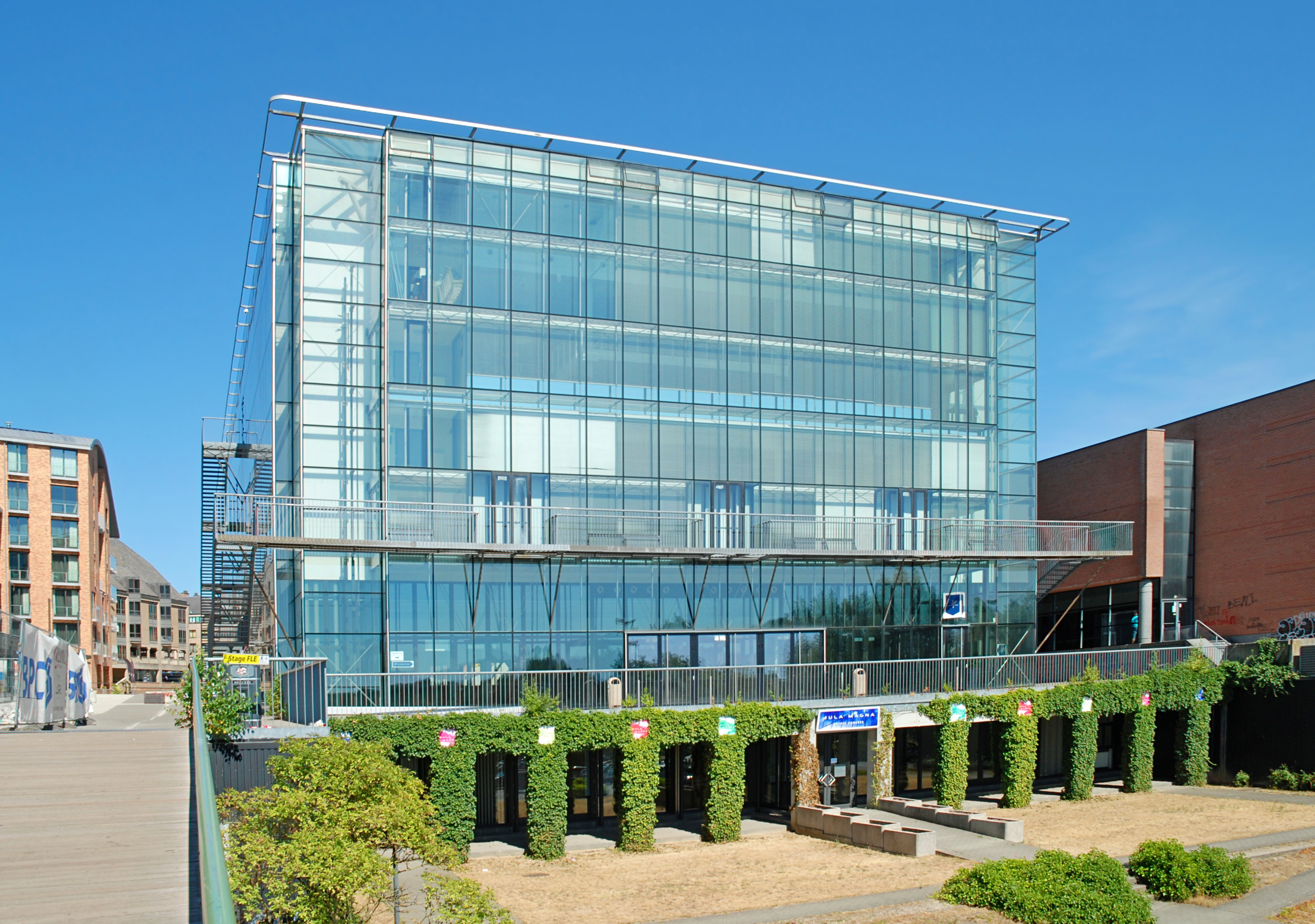 Belgique - Louvain-la-Neuve - Aula Magna (postmodernisme, bureau d'architecture Philippe Samyn and Partners, 1999-2001)